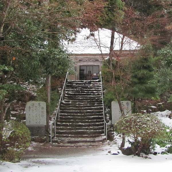 多禰寺の冬